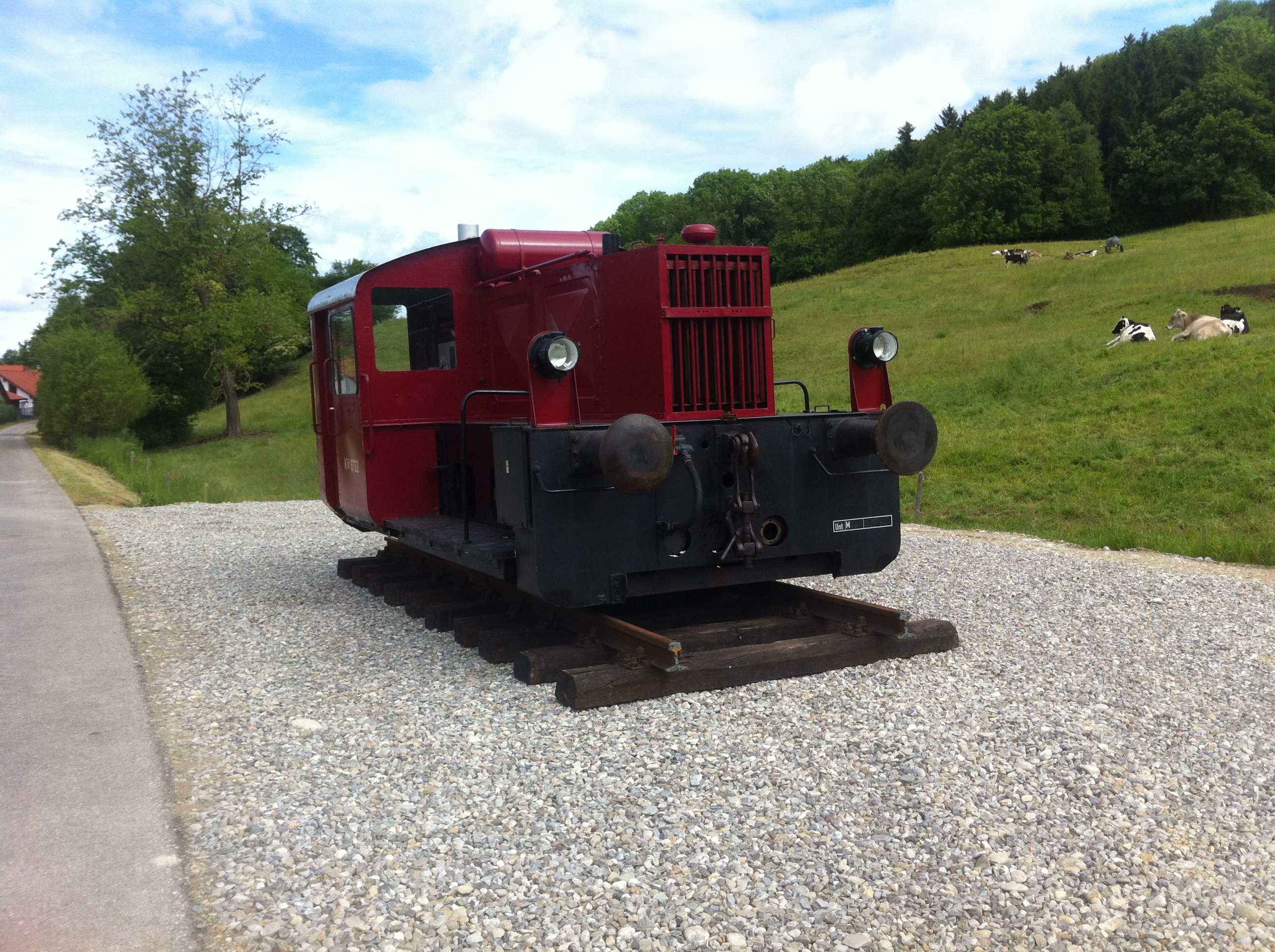 Eine Köf II am Wegesrand des Themenradweges Sachsenrieder Bähnle bei Helmishofen